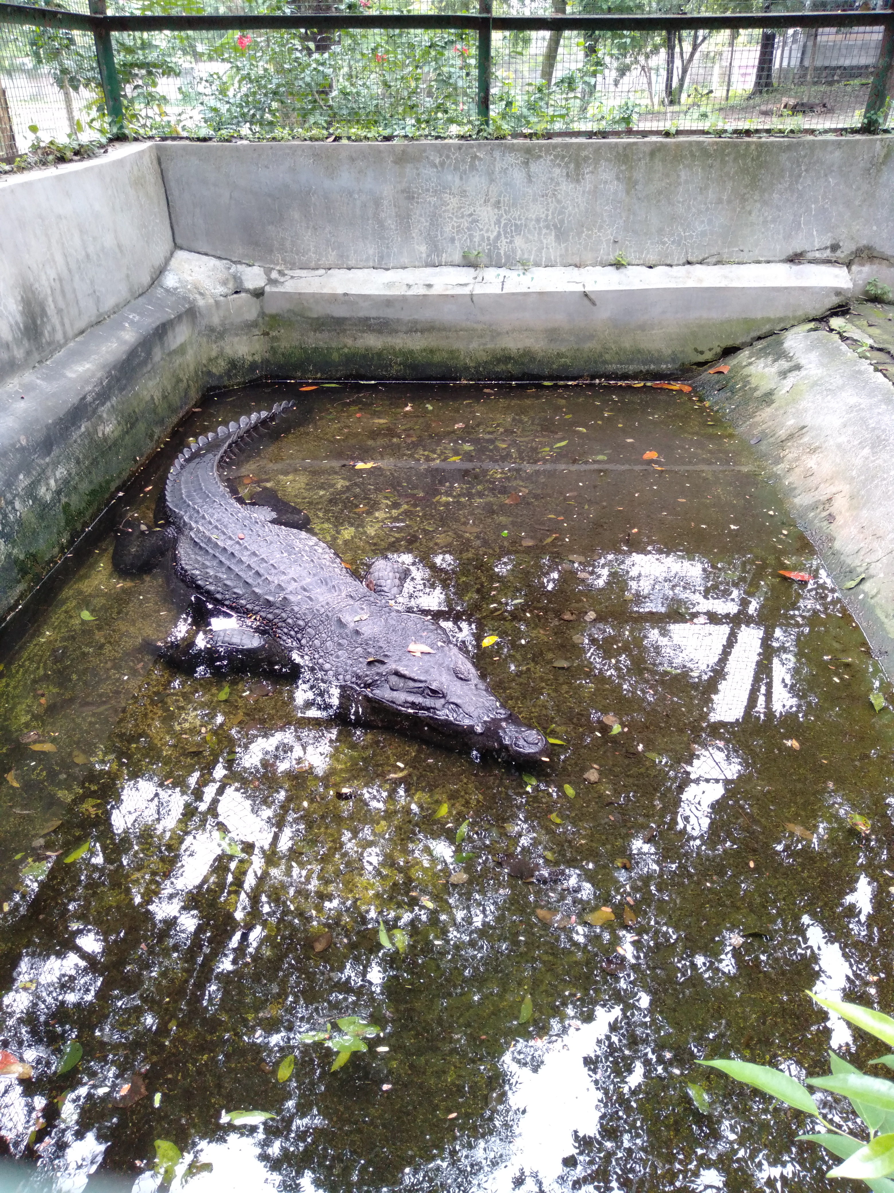 Jawa: Baya iku ana ing taman wisata Jurug Solo. Menawa kepéngin ndeleng jinising baya liyané bisa langsung wae mara ing taman wisata iku. Bayané katon anteng lan ora mbebayani amarga wis dikrangkéng